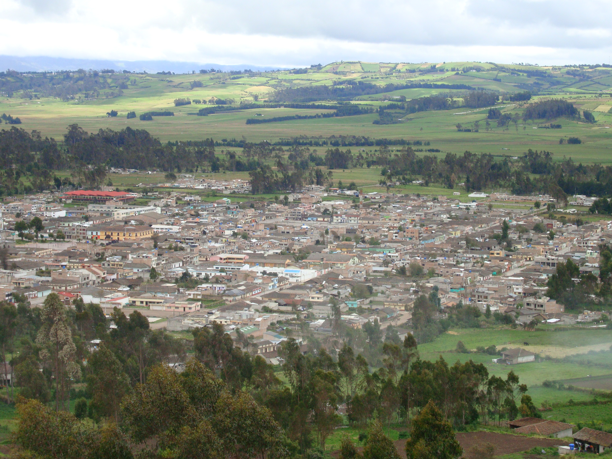 Fotografía general del casco urbano de Cumbal...